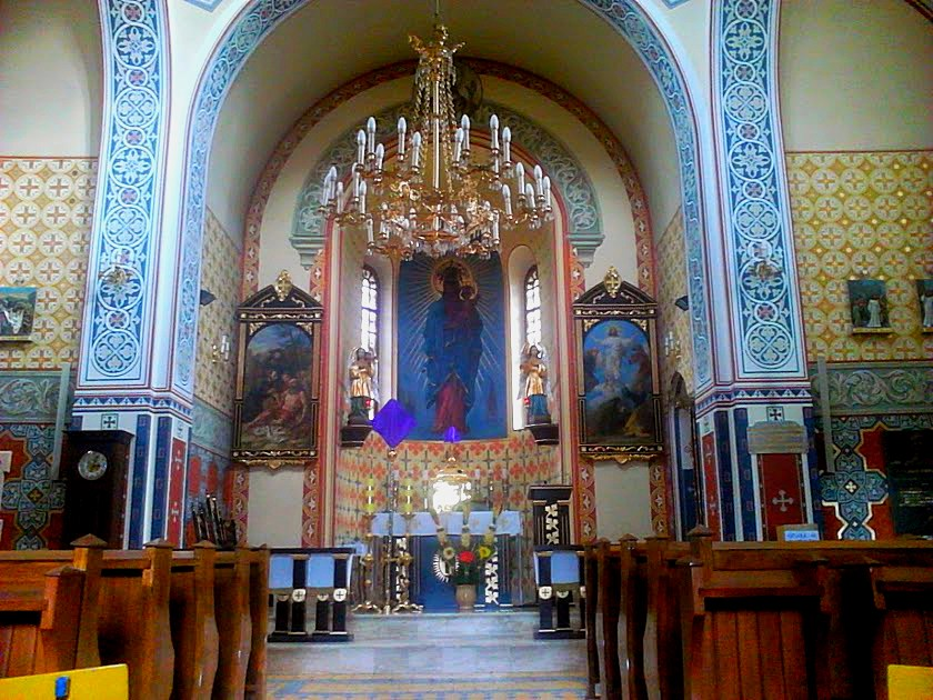 Wnętrze kościoła Przemienienia Pańskiego (dawnej cerkwi) przy szpitalu psychiatrycznym w Tworkach